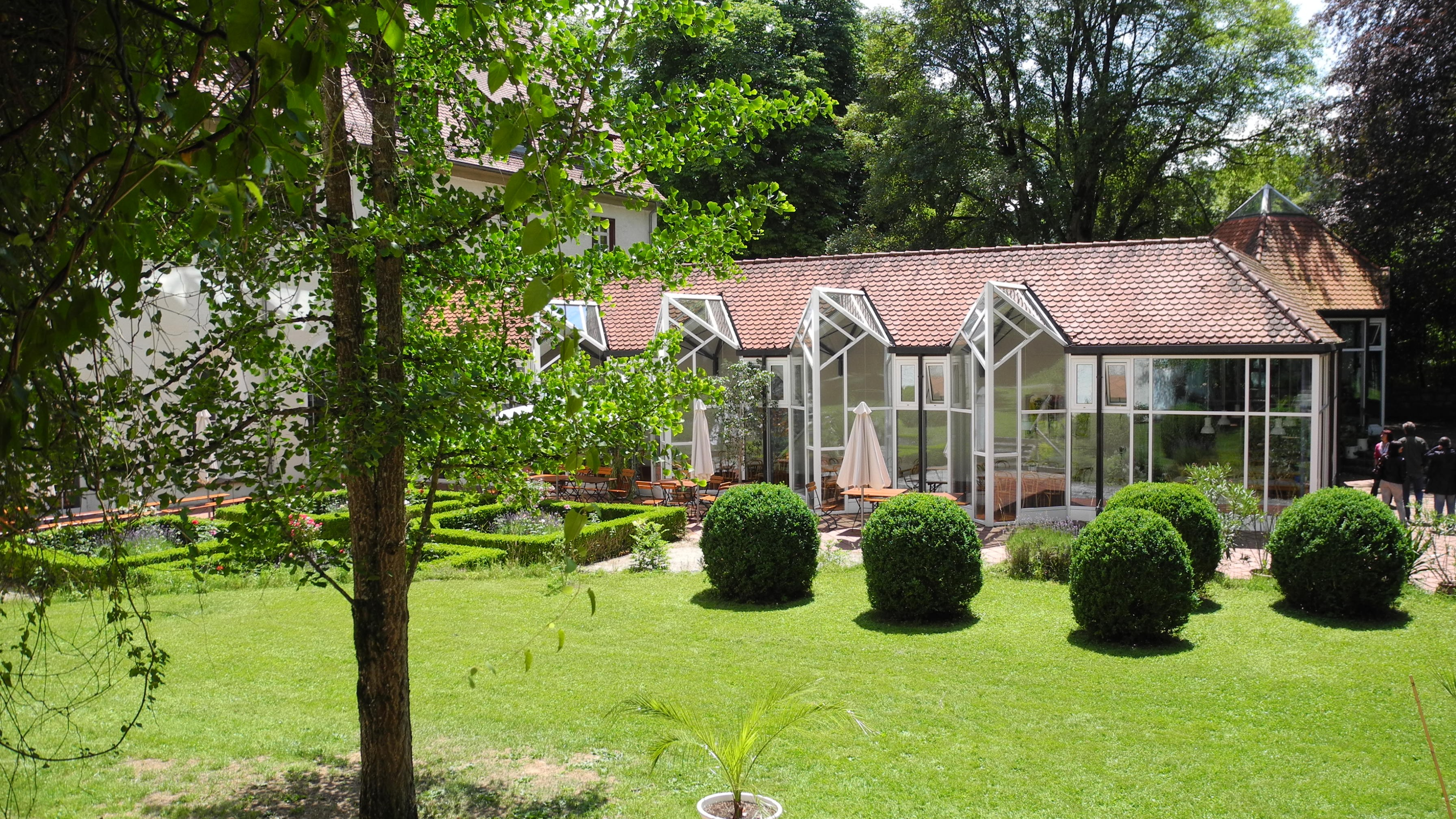 Schelklingen - Ehemal. Kloster Urspring, Internat03